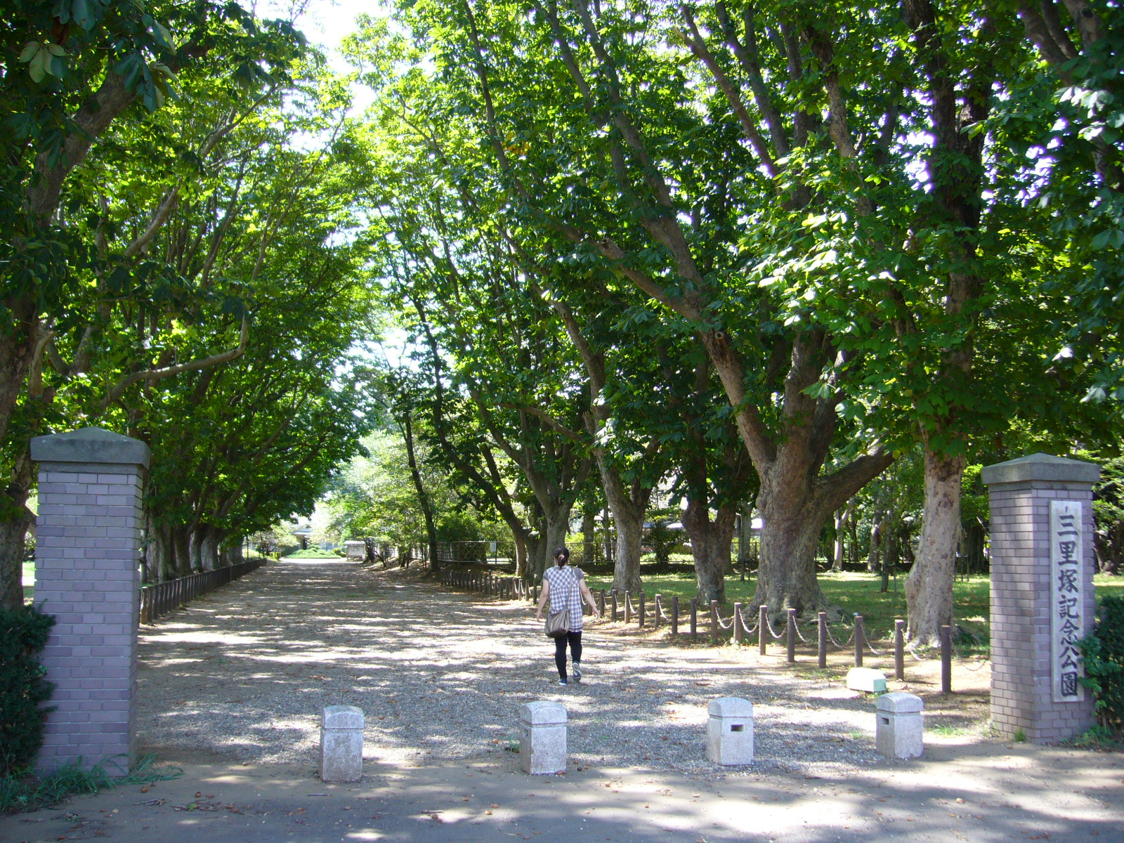 sanrizuka-park,old-sanrizuka-goryou-farm,narita-city,japan